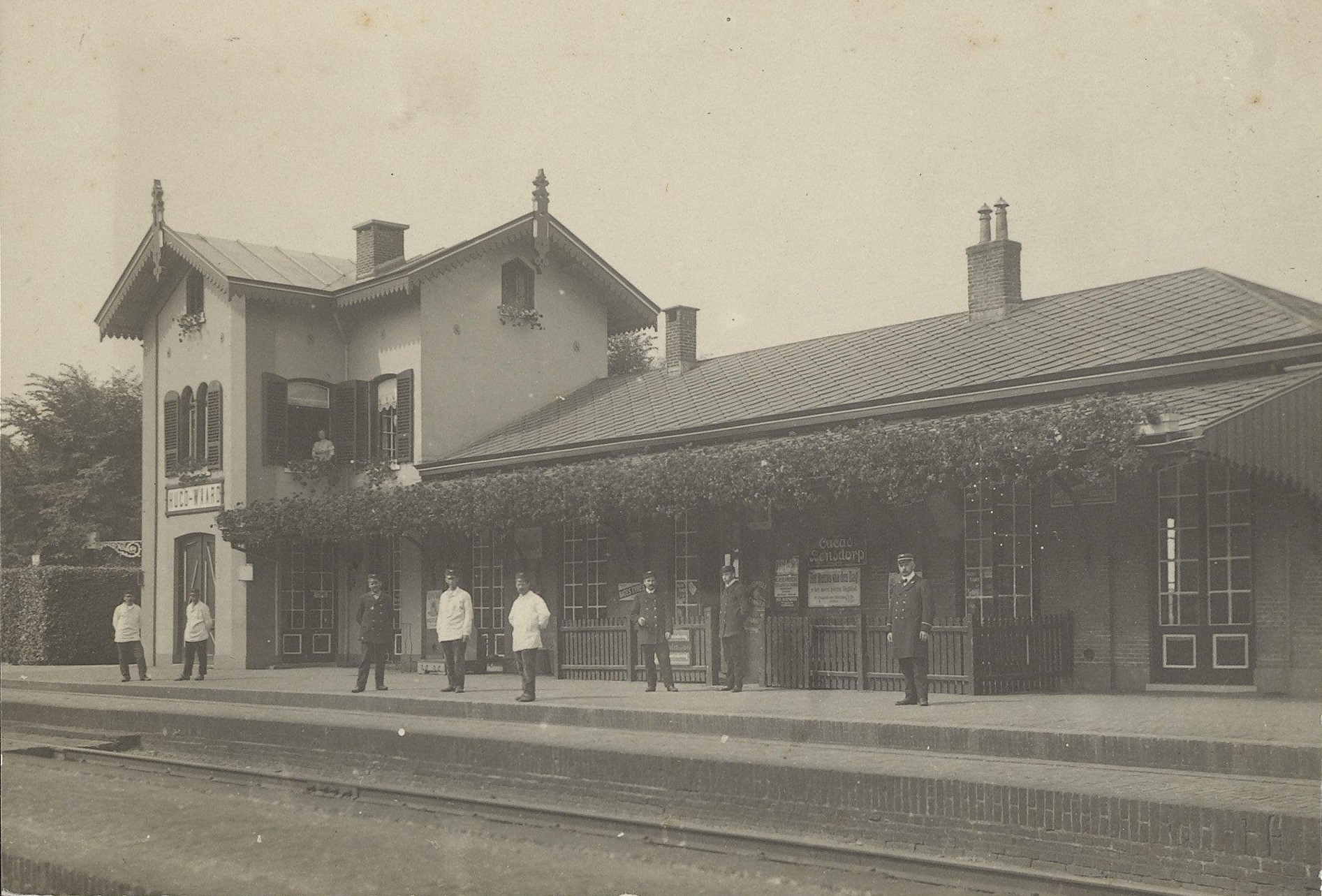 Vervaardiger onbekend Catalogusnummer: RAA003009286